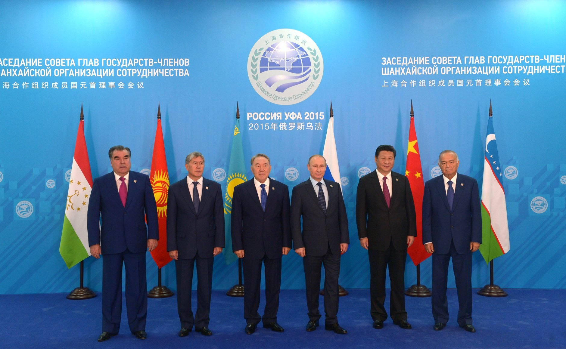 Участники заседания Совета глав государств – участников Шанхайской организации сотрудничества